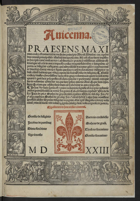 Page de titre rubriqué dans Avicenna. Praesens maximus codex, imprimé en 1523 Avicenna, "Praesens maximus codex" [vol. 1]. Editeur : Venetiis a Philippo Pincio Mantuano impresse. Anno domini 1523. Die. 27. Julii. Sumptibus vero domini Luceantonii de Gionta Florentini. Giunta (Venezia) Disponible en ligne